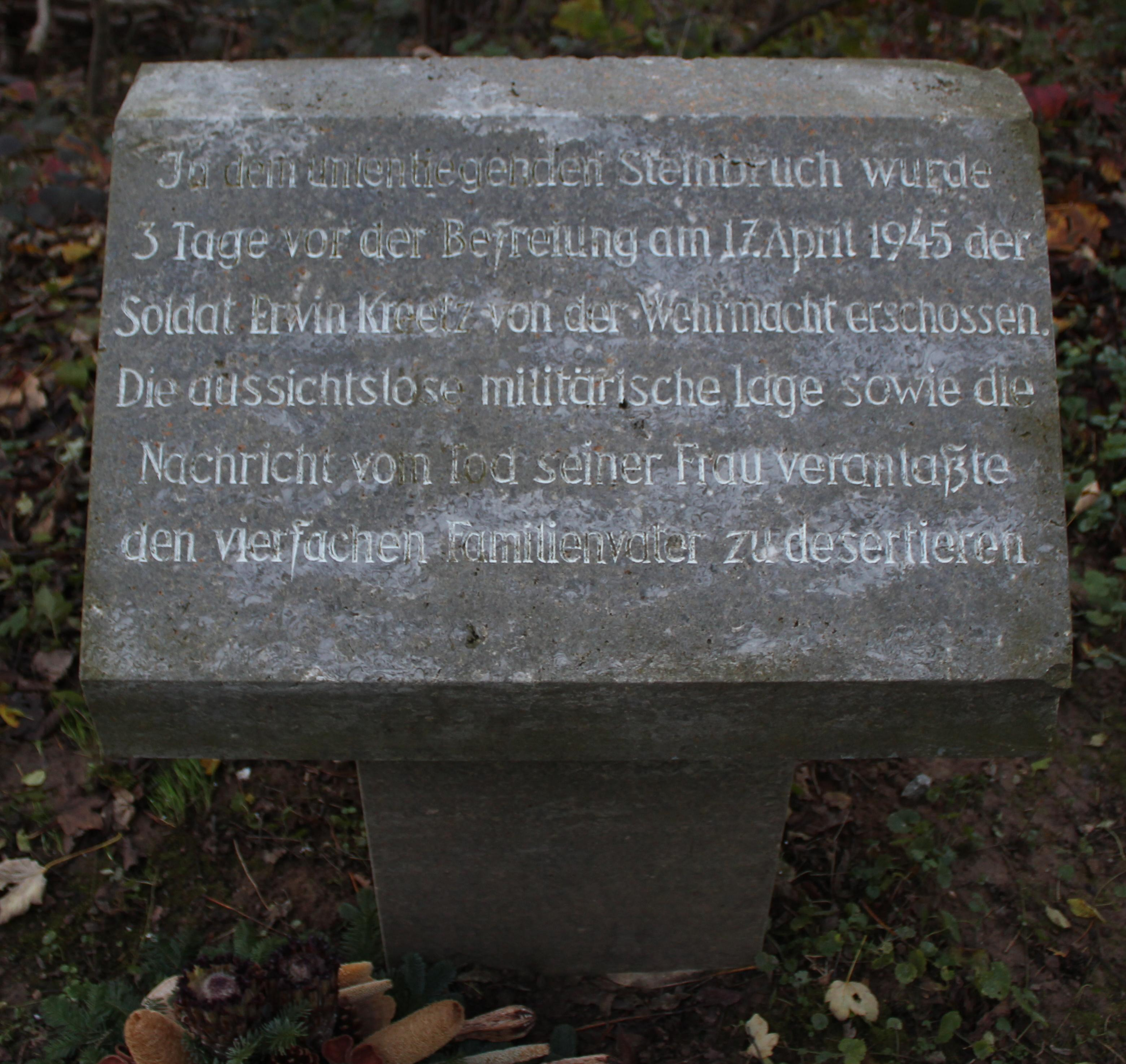 Gedenktafel für den desertierten Soldaten Erwin Kreetz, der am 17. April 1945 kurz vor Ende des 2. Weltkrieges in einem Steinbruch zwischen Steinheim an der Murr und Kleinbottwar exekutiert wurde.